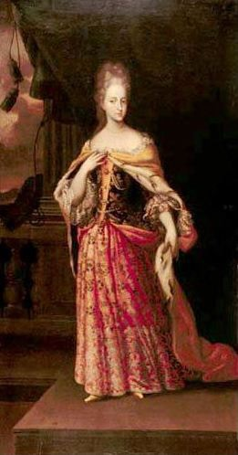 Portret Marii Antoniny, elektorowej bawarskiej (1669-1692)